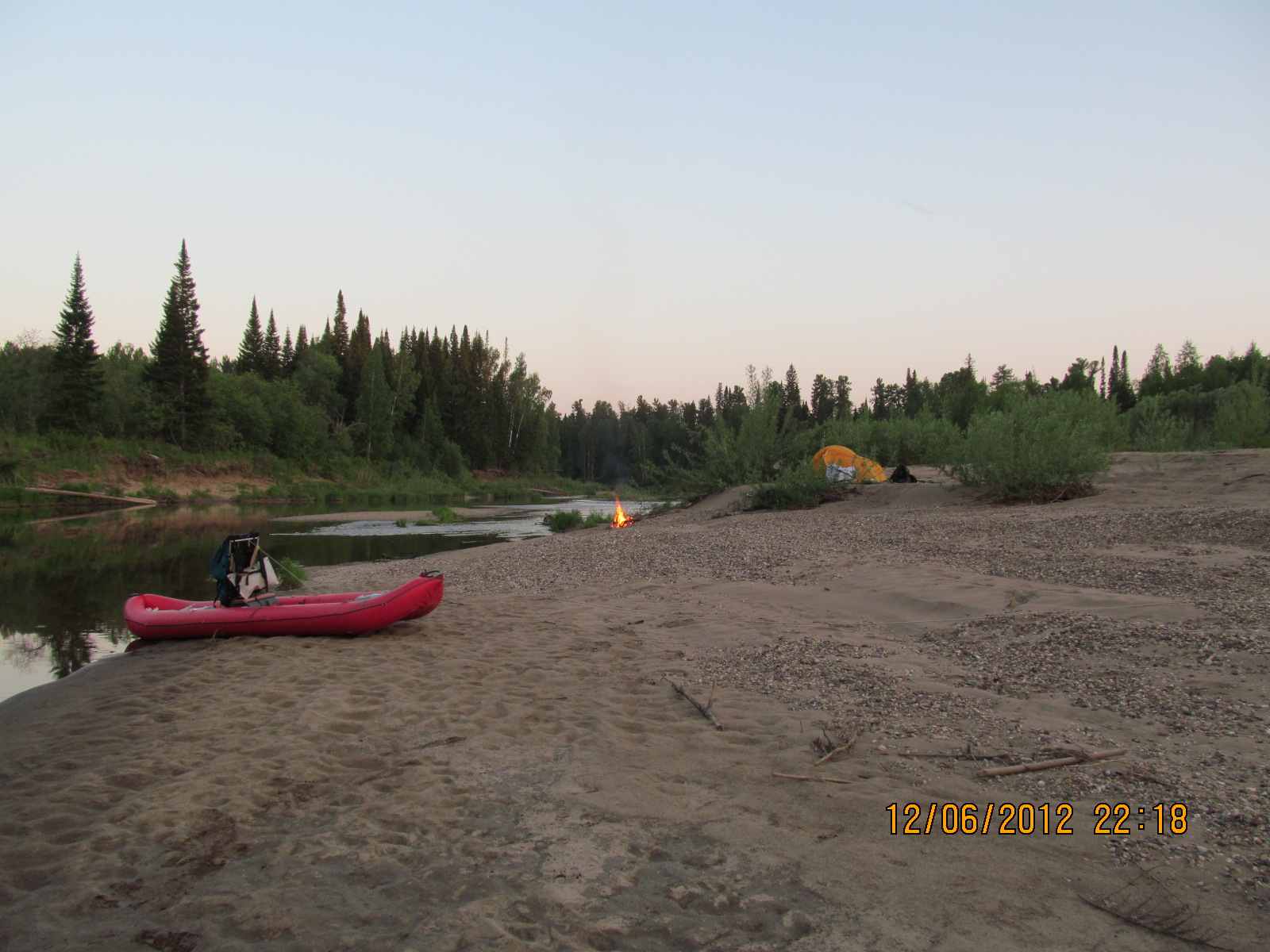 Вечер на пляже.